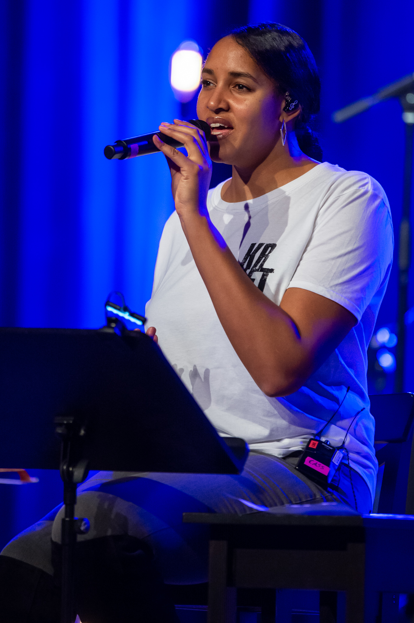 Cassandra Steen,Concertbüro Franken,Glashaus,Konzert,Livekonzert,Livemusik,Markgrafensaal,Musik